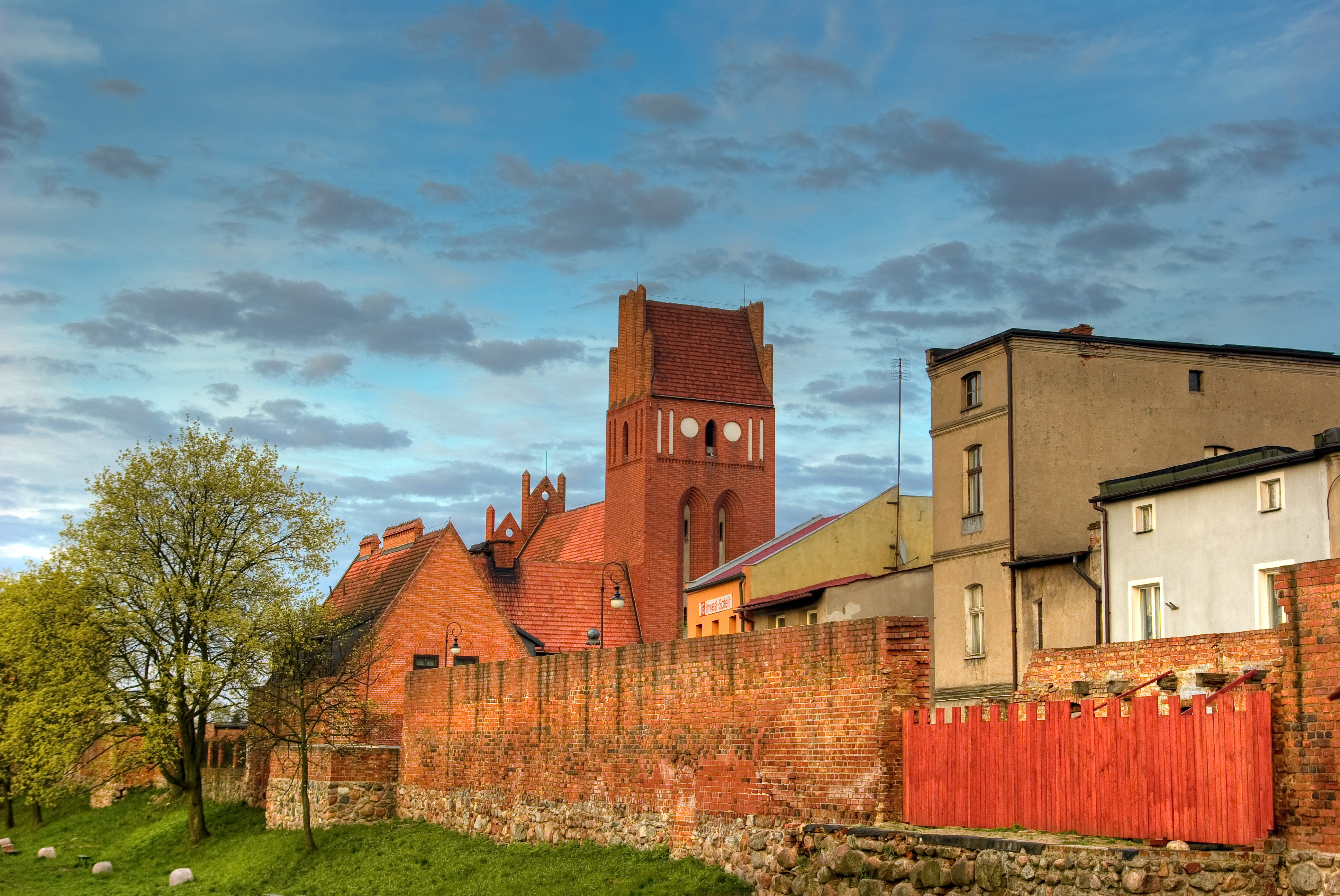 Golub-Dobrzyń - mury obronne, widok z ulicy Hallera 12.1959.